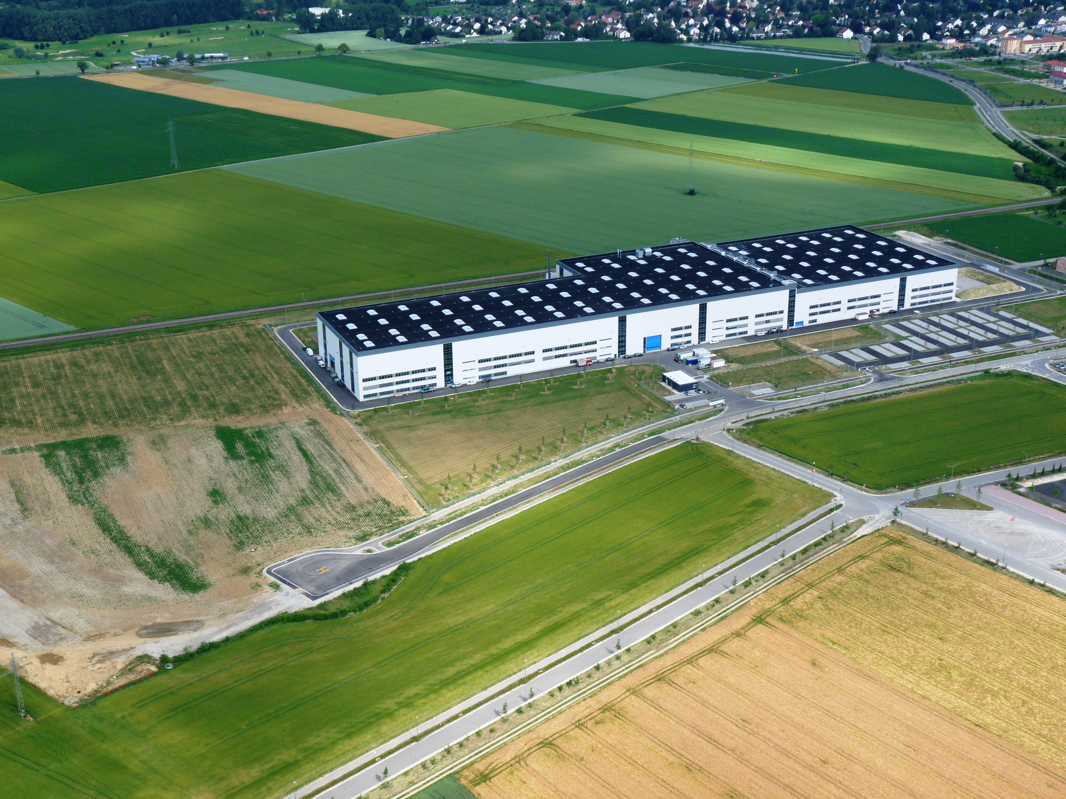 Premium Aerotec 1106